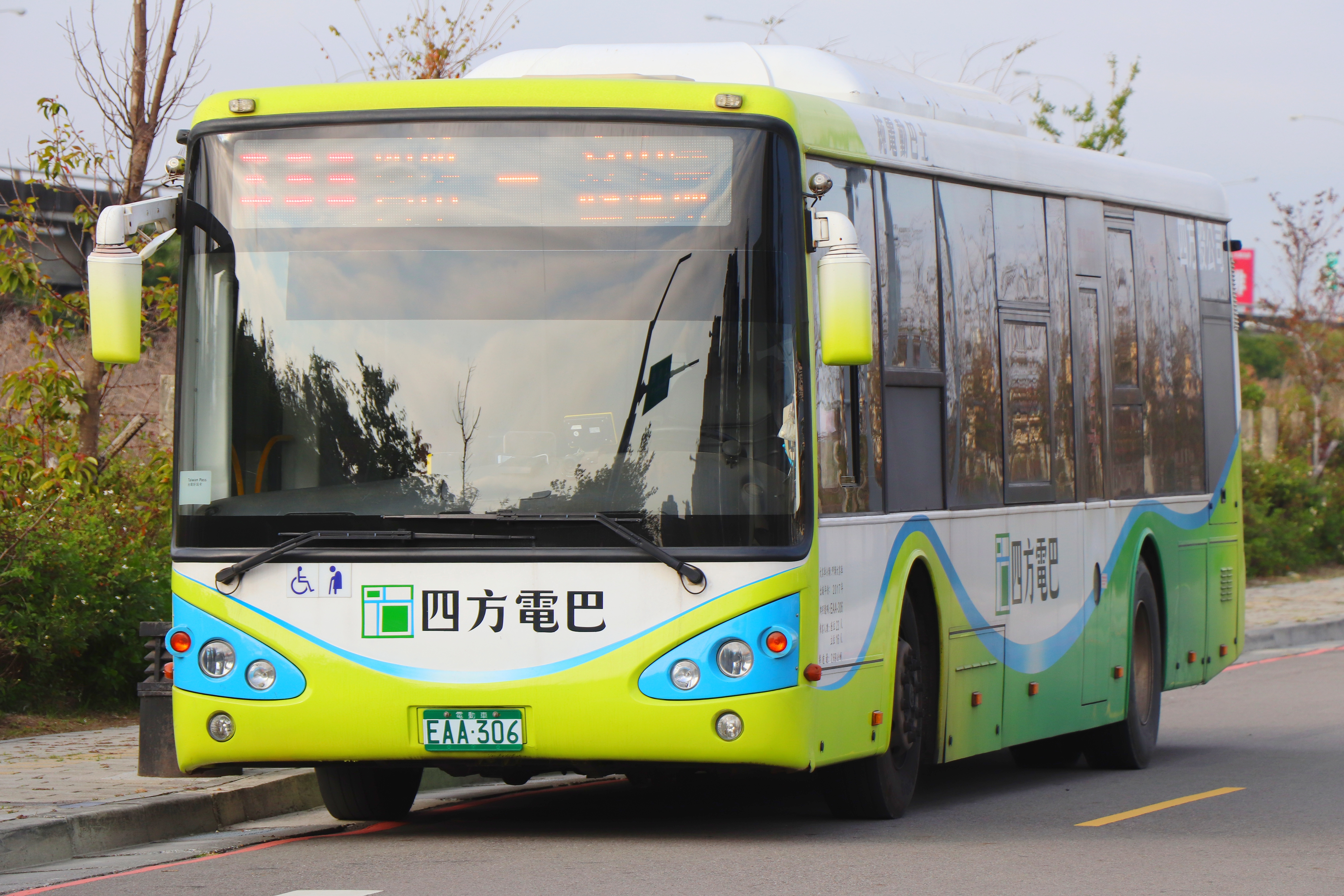 四方公司 申沃客車SWB6127EV大客車 EAA-306